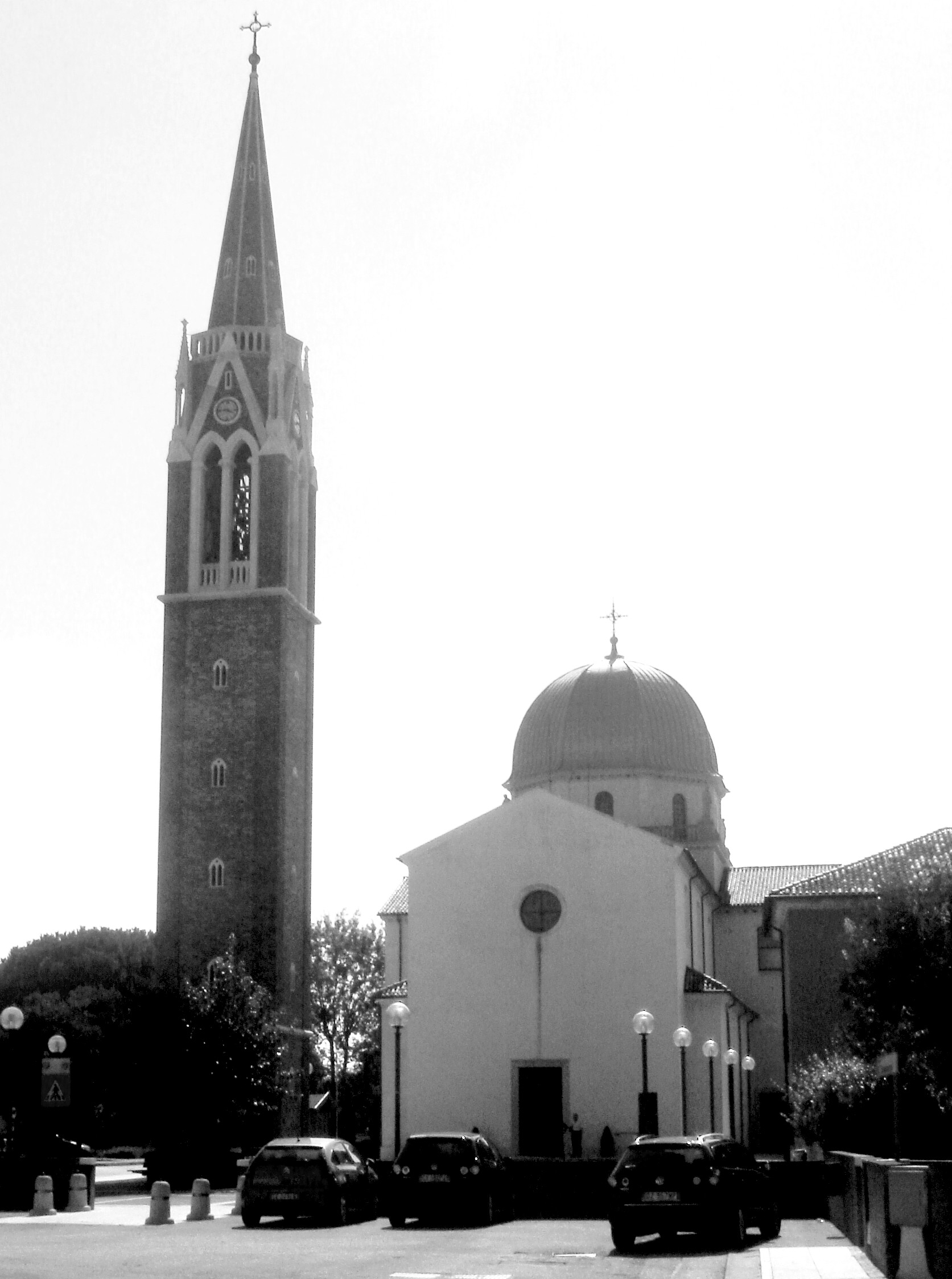 Chiesa di Gaiarine (TV)